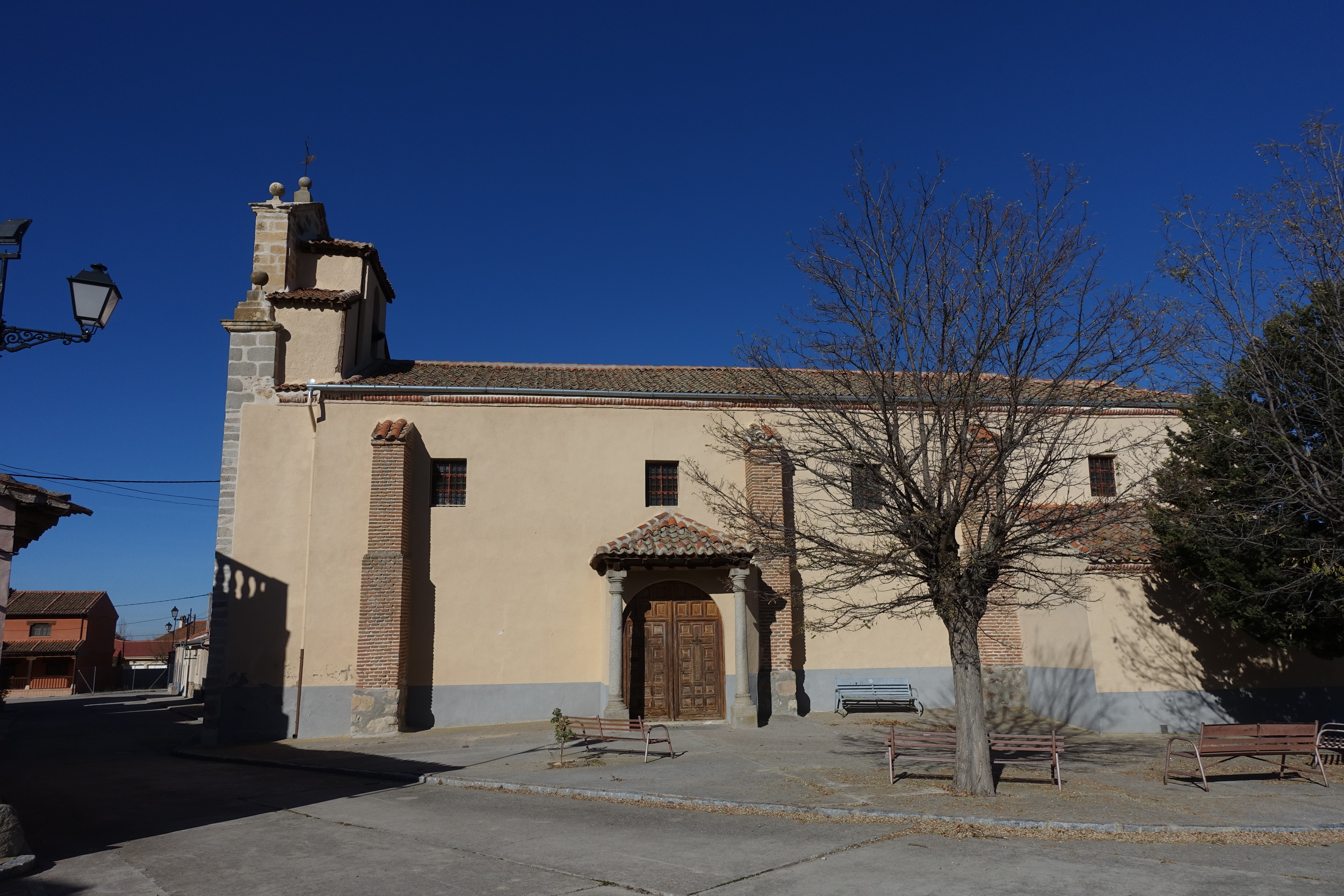 Iglesia de Santiago, Anaya (Segovia, España).